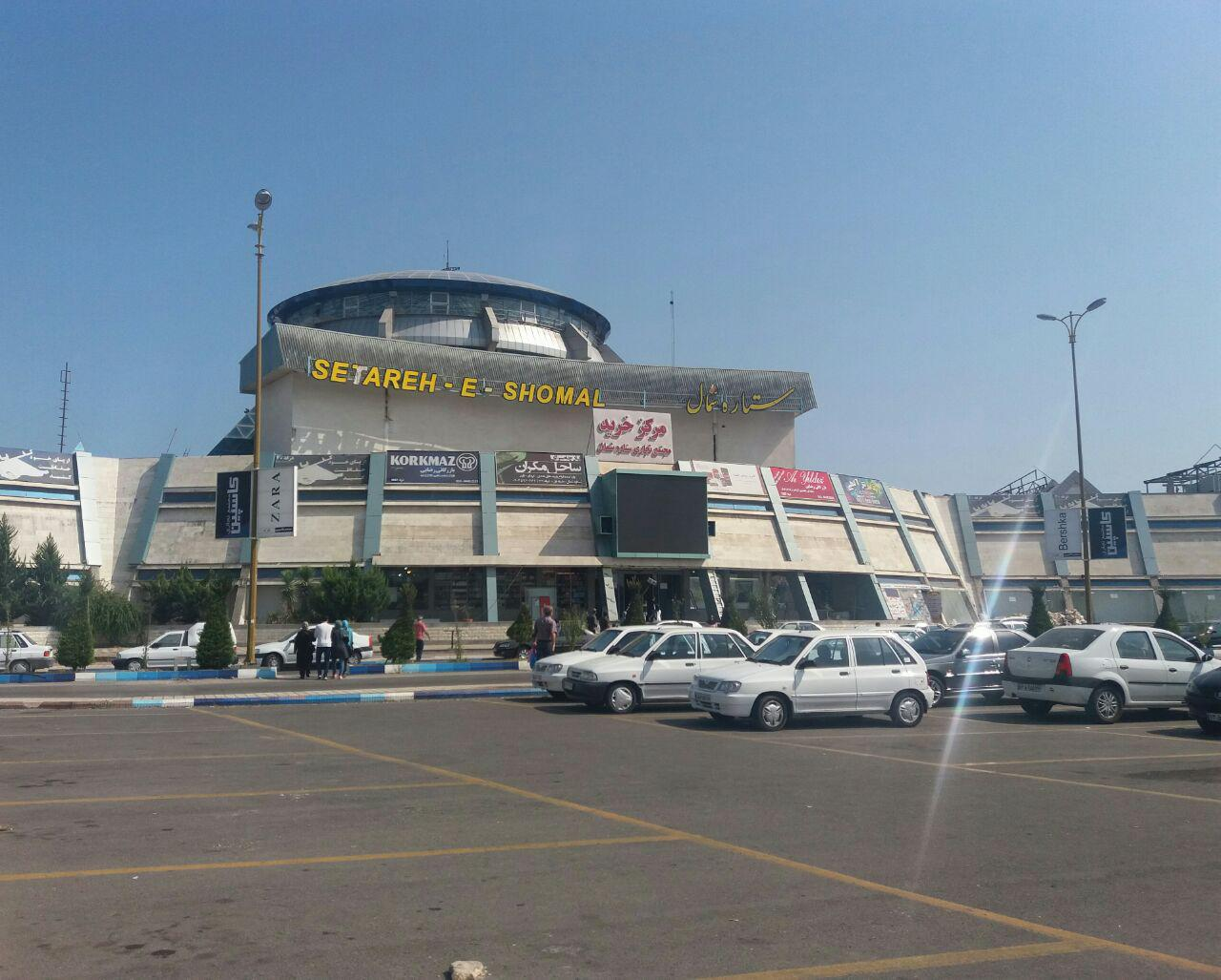 مرکز خرید ستاره شمال در منطقه آزاد انزلی